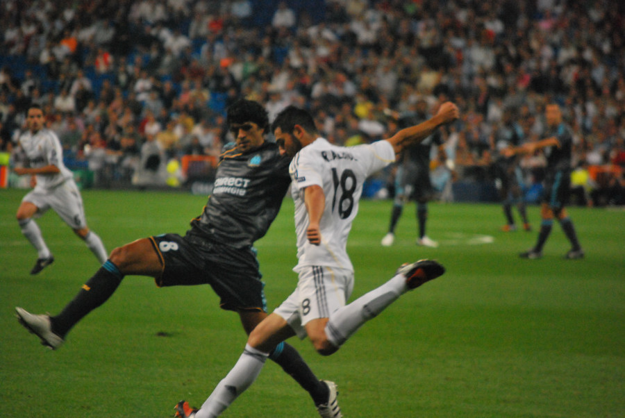 Champions League Real Madrid 3 - O.Marsella 0 30/09/09 Raul Albiol (Madrid) v Lucho Gonzalez (Marseille)